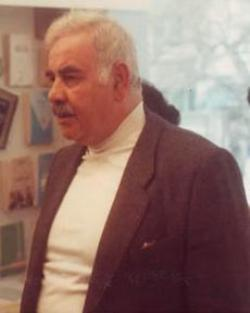 النائب اللبناني السابق السيد جعفر شرف الدين، ابن السيد عبد الحسين شرف الدين. من مواليد بلدة شحور عام 1920 ، توفي عام 2001